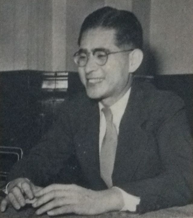 下村治